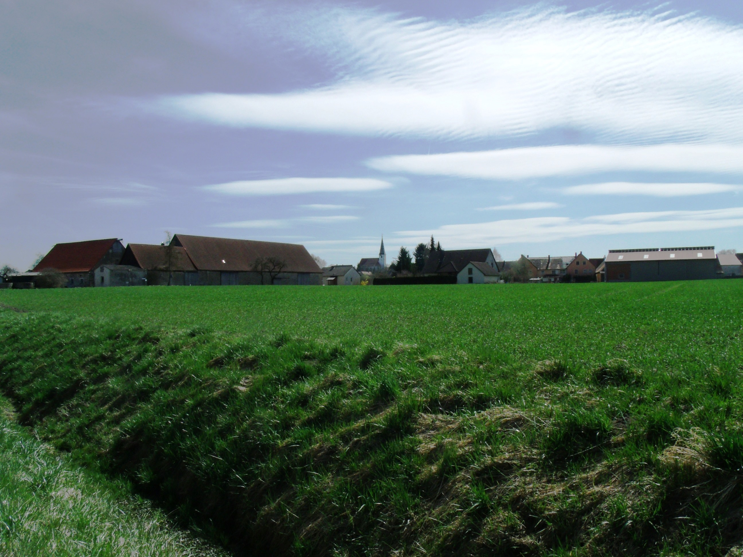 Hetzweiler, Ortsteil von Leutershausen im Landkreis Ansbach